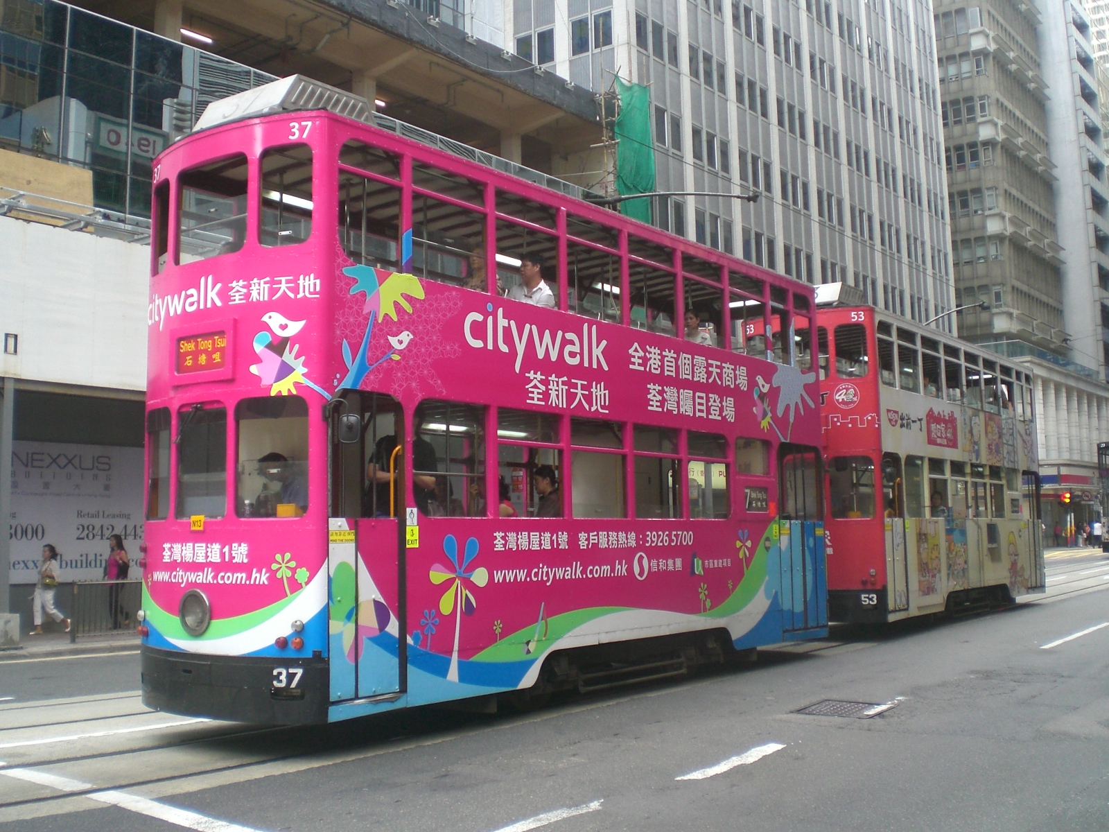 香港中環德輔道中，一輛香港電車有荃新天地車身廣告